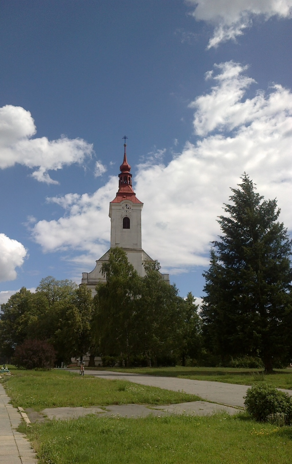 Kostel svatého Josefa v Jevišovicích